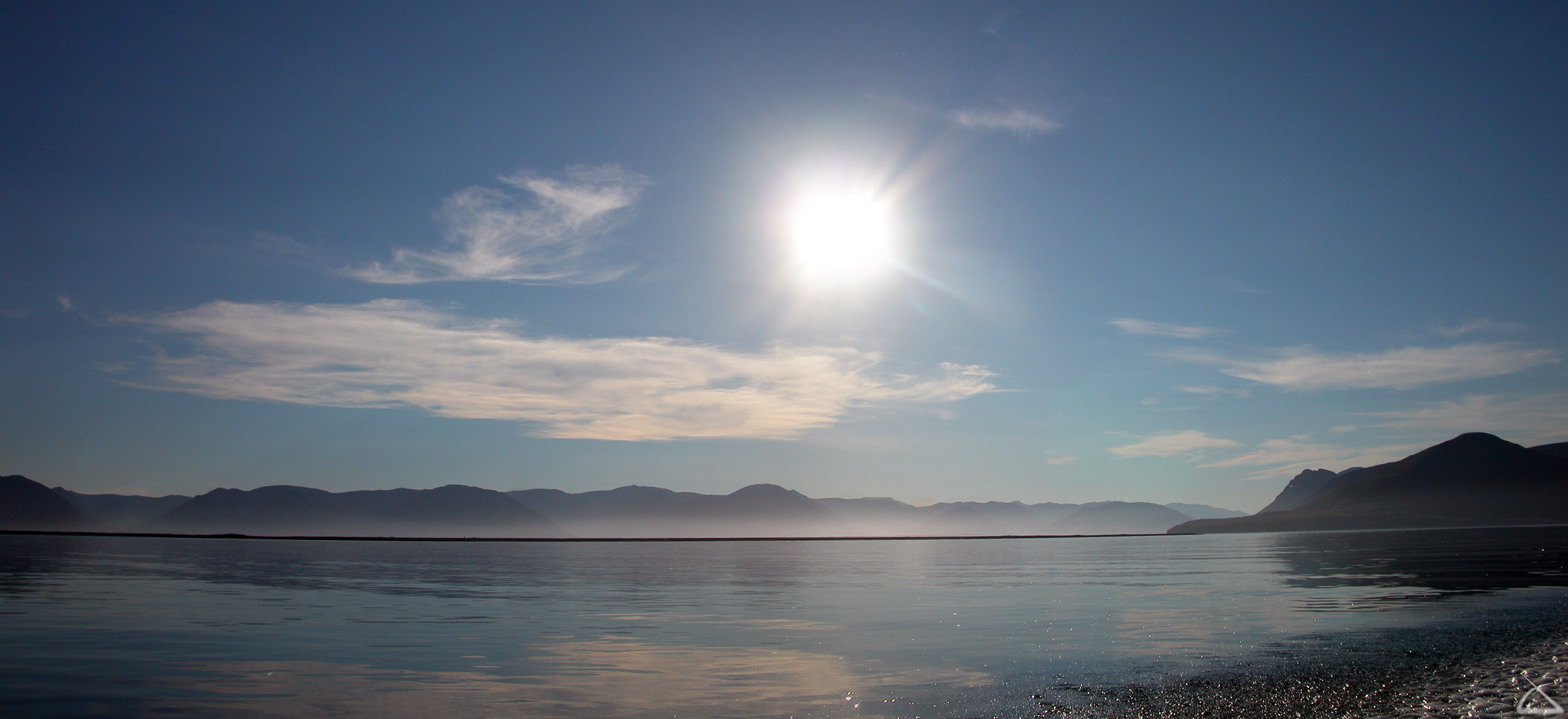 Залив Креста